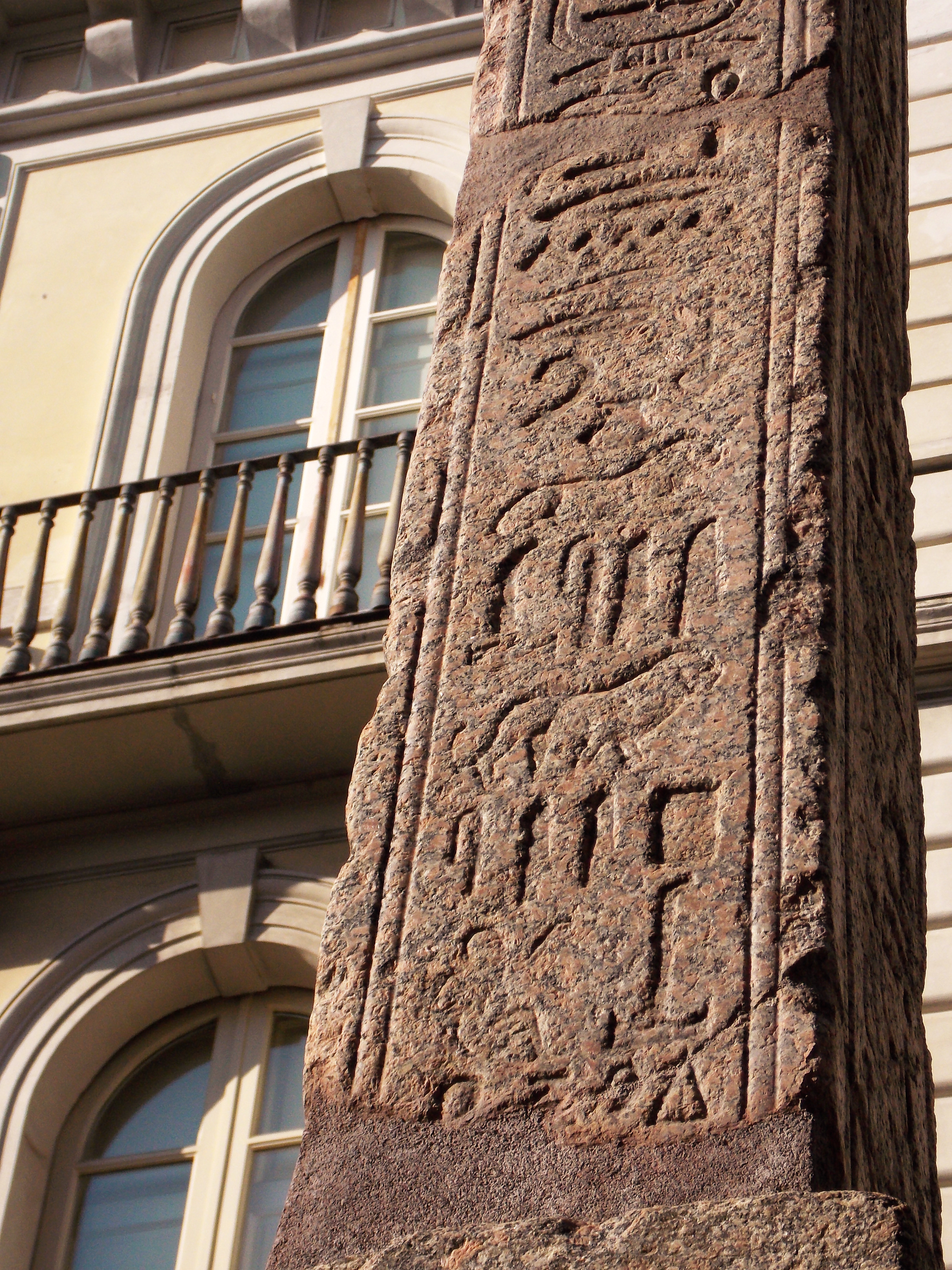 L'obelisco neoegizio di Piazza Papiniano a Benevento, proveniente dal tempio di Iside